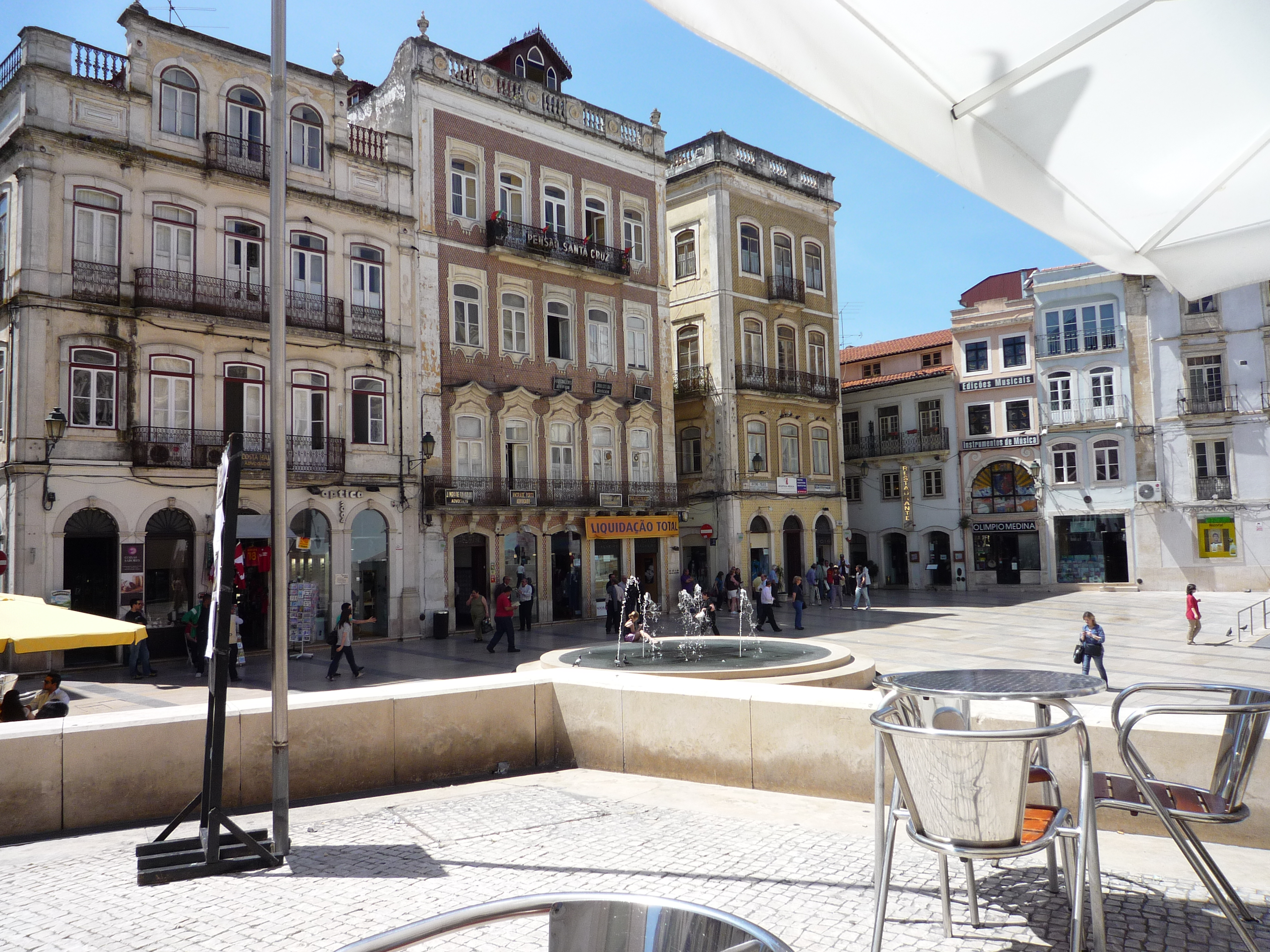 Square in Coimbra